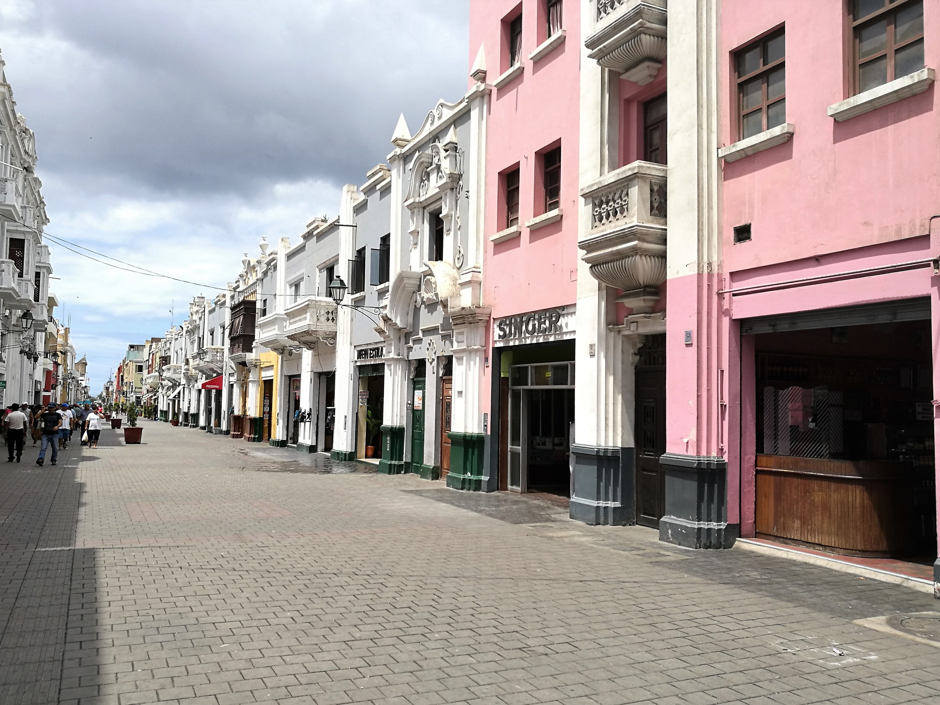 Jirón Francisco Pizarro de Trujillo